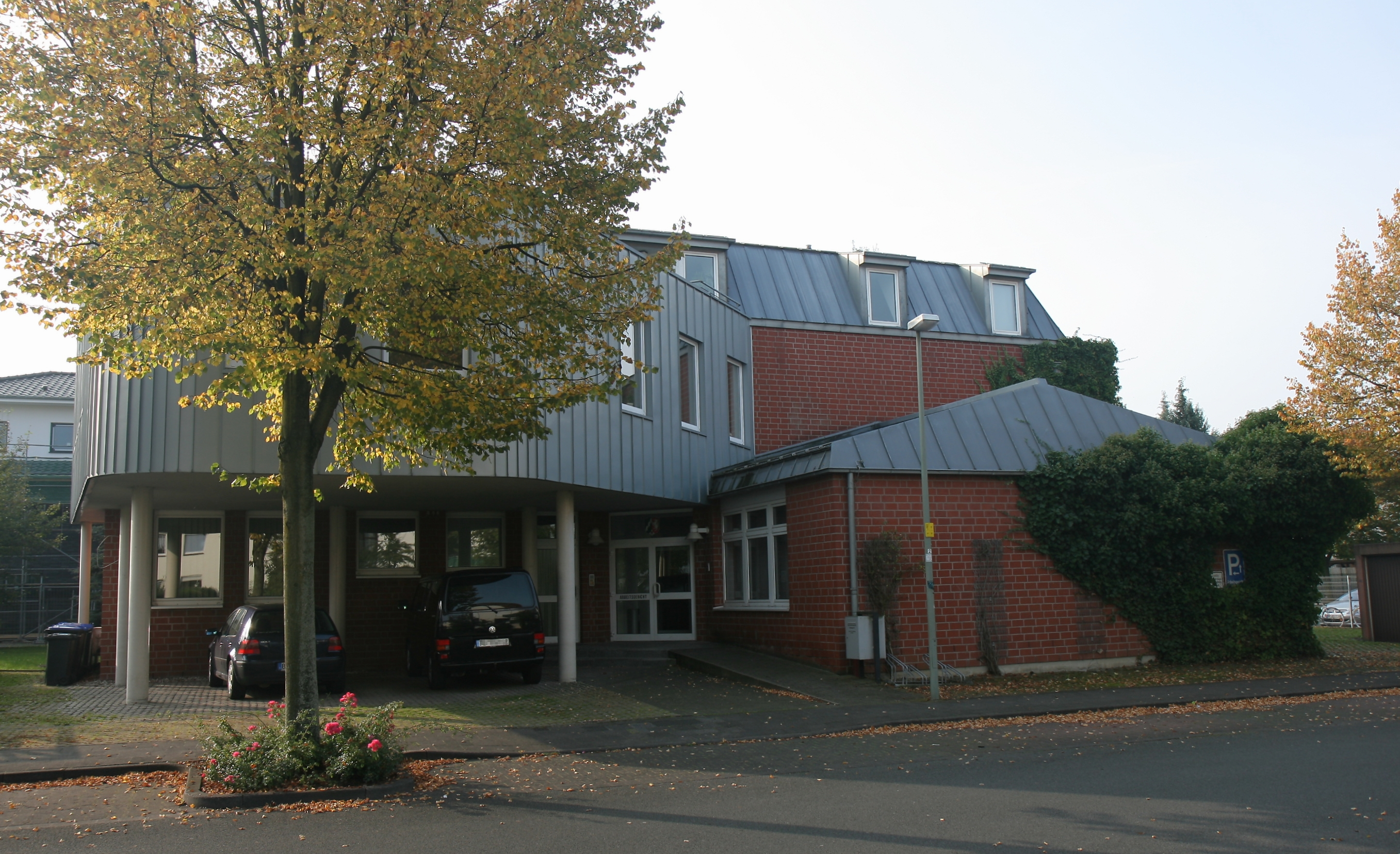 Gebäude des Arbeitsgerichts Paderborn, Grevestraße 1 in Paderborn. Grundsteinlegung am 10. November 1989, bezogen am 2. April 1990.